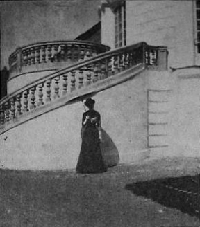 Беларуская (тарашкевіца): Бачэйкаў (Bačejkaŭ), палац Цеханавецкіх (Ciechanaviecki)